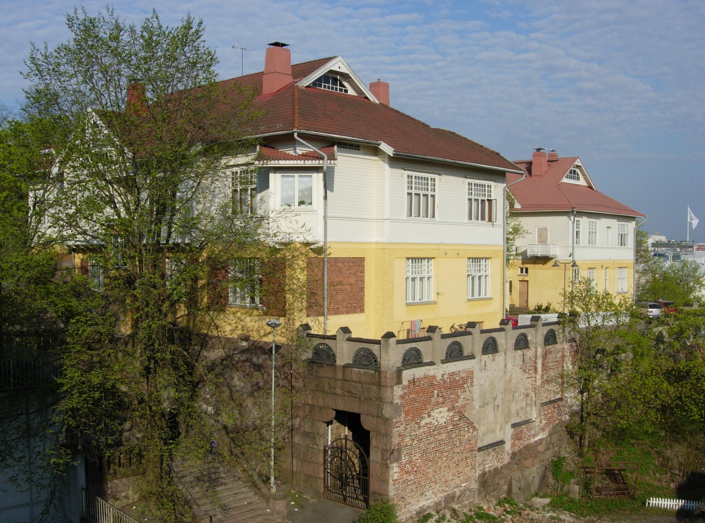 Adrian Thomanderin vuonna 1907 suunnittelema jugend-rakennus Turussa, Mustainveljestenkuja 3:ssa.